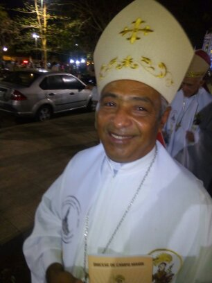 Dom Juarez Sousa da Silva, mm bispo no Piauí, na diocese de Parnaíba.